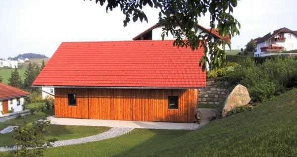 2002 von der Dorfgemeinschaft Bimberg erbaut